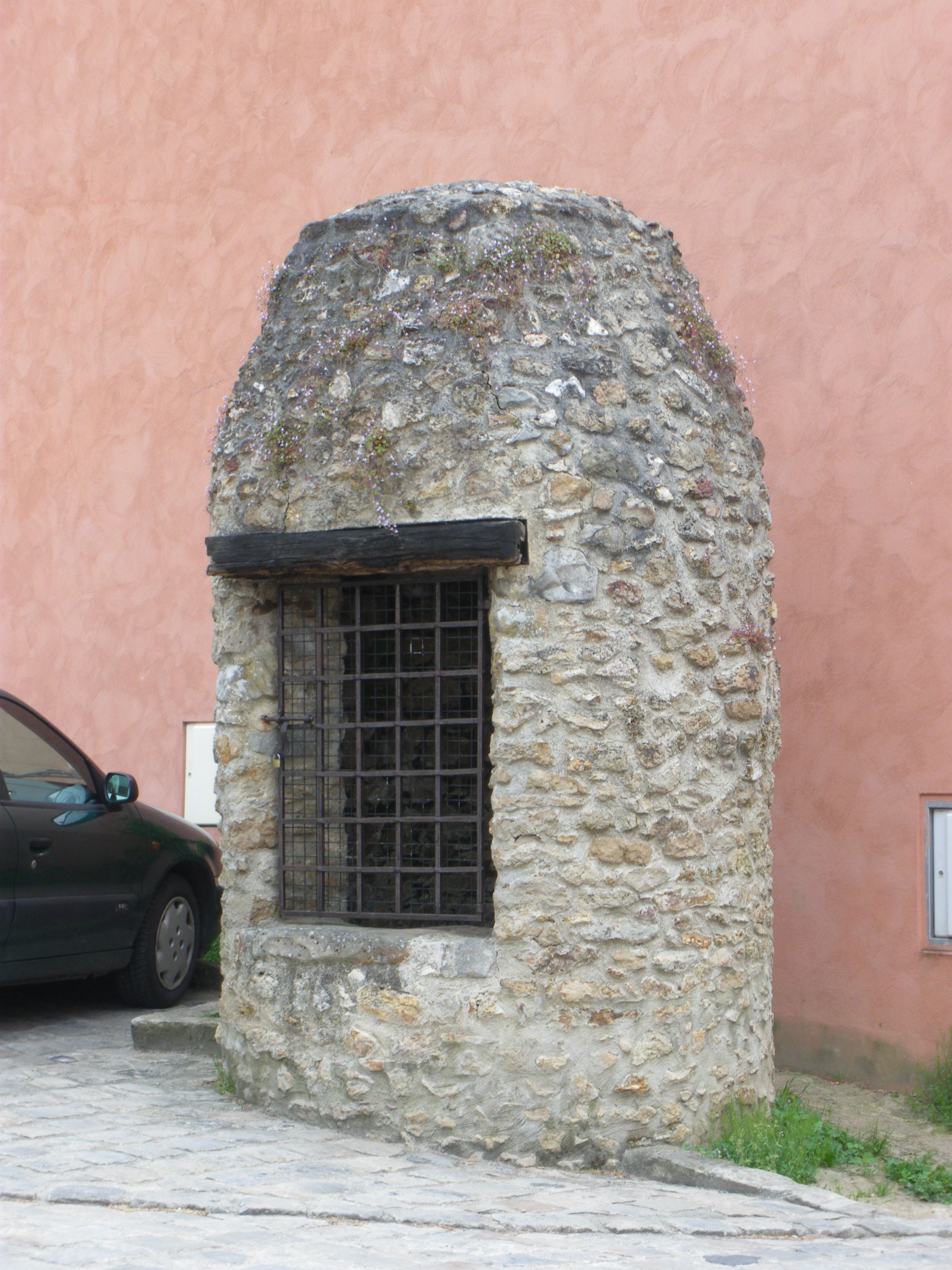 Angervilliers, Essonne, France